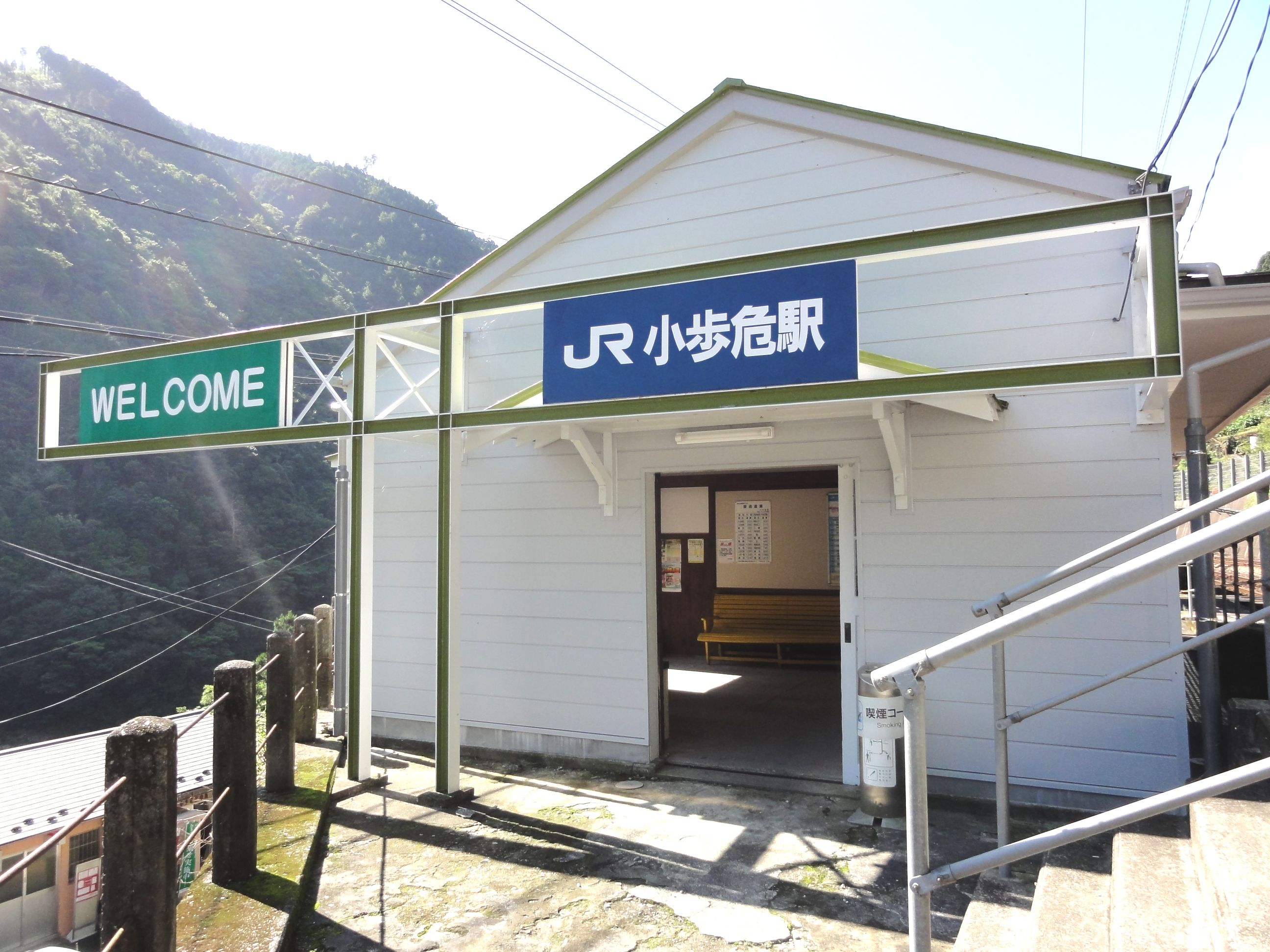 土讃線 小歩危駅